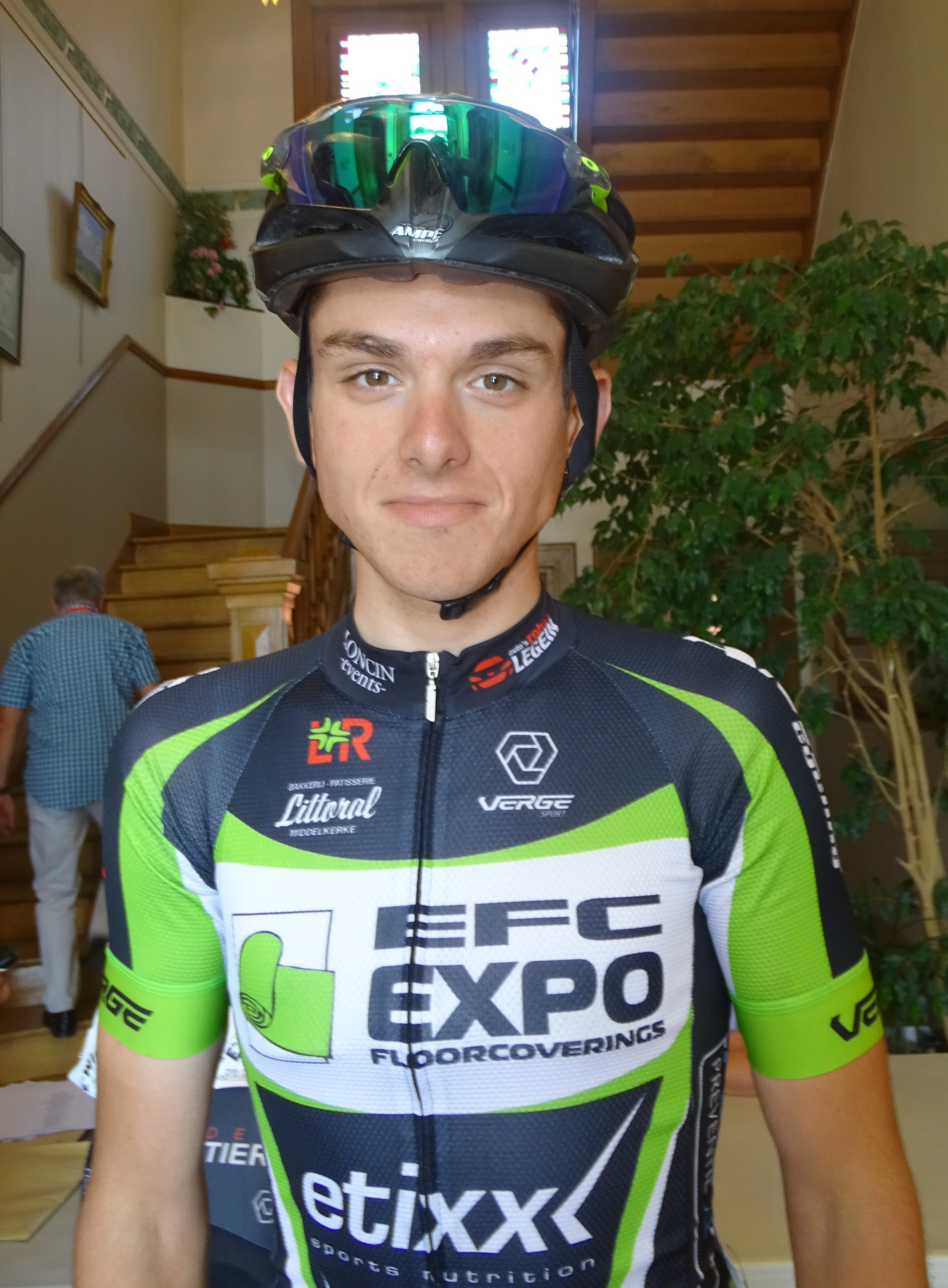 Reportage réalisé le dimanche 24 juillet à l'occasion du départ et de l'arrivée du Grand Prix de la ville de Pérenchies 2016 à Pérenchies, Nord, Nord-Pas-de-Calais, France.